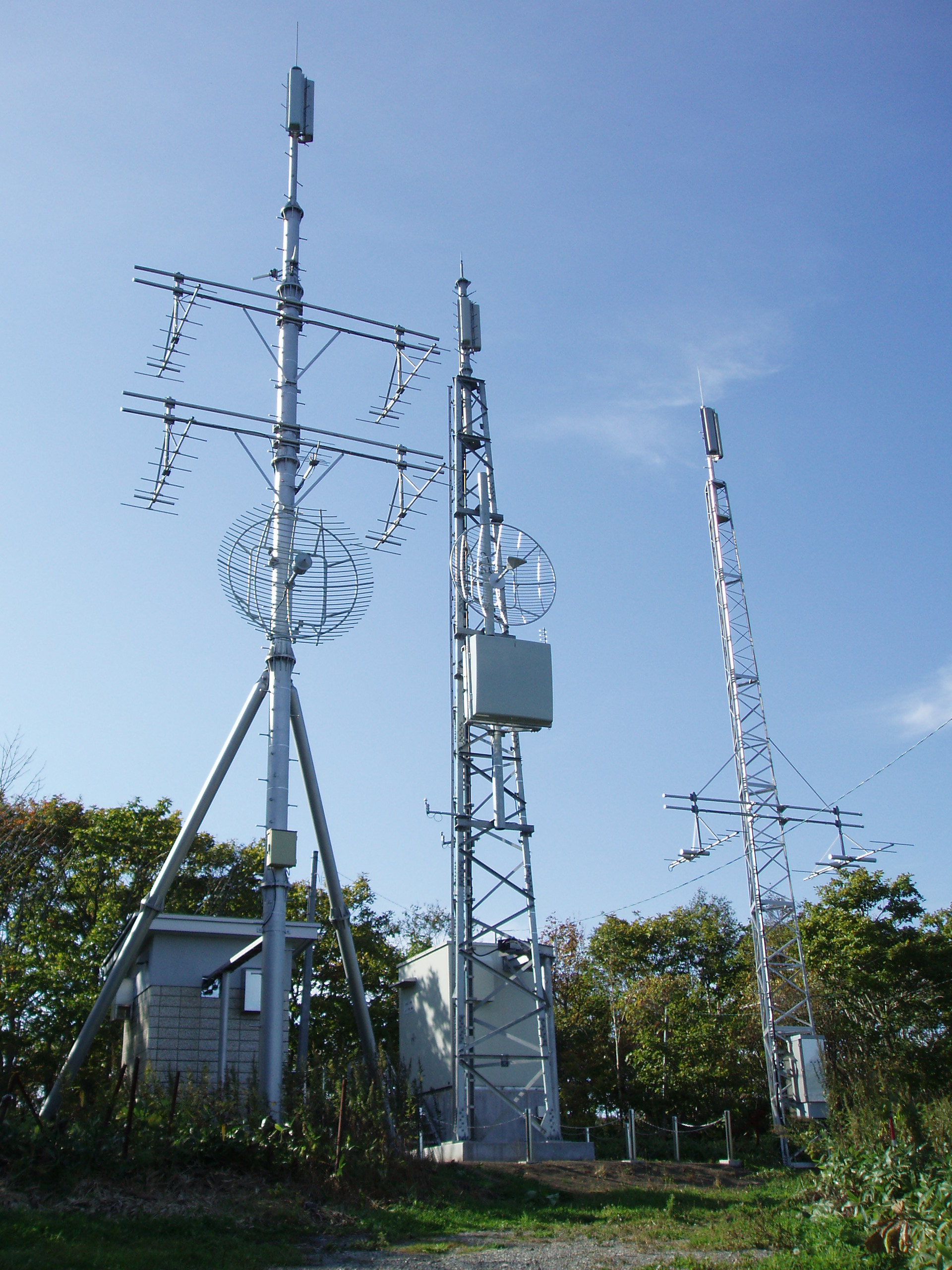 白糠中継局（左から民放アナログ、全局デジタル、NHK白糠西アナログ）